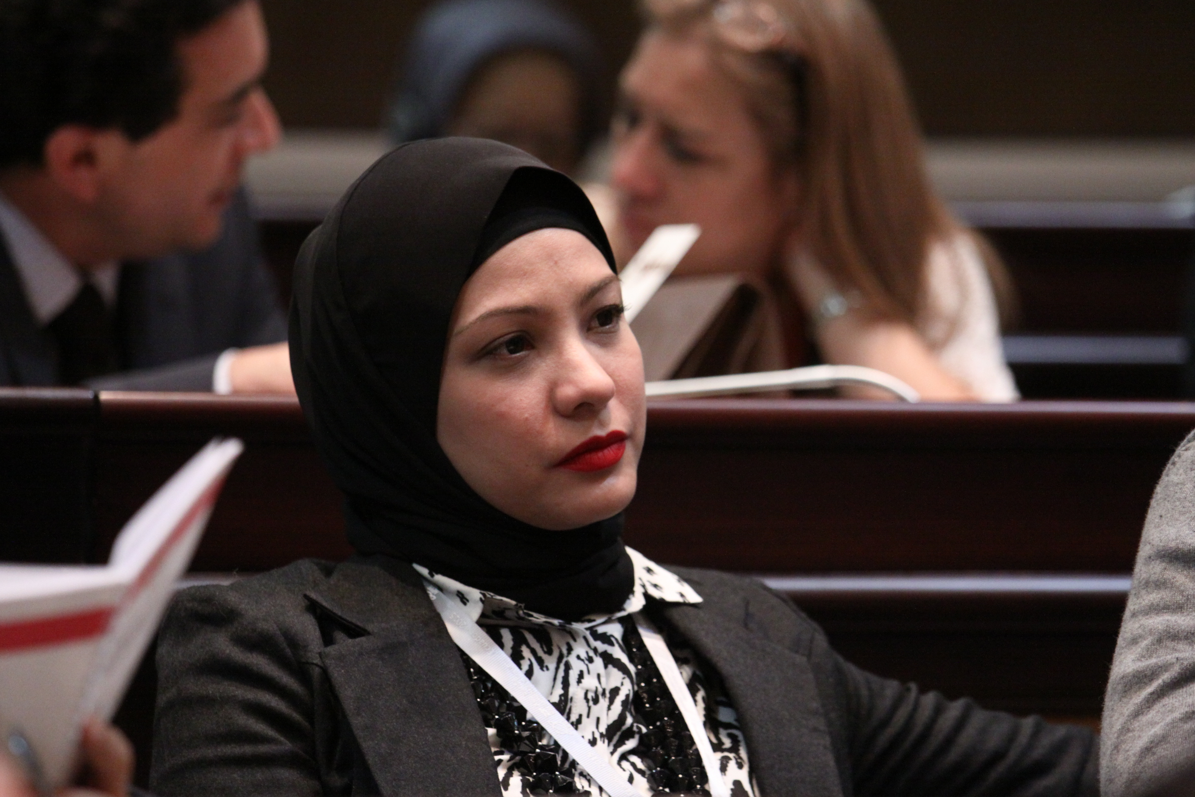 Quito, 13 enero de 2015.- Delegación de Indonesia presente en la Quinta sesión plenaria y situación internacional: Cooperación Regional en la región Asia Pacífico Fotografía: Hugo Ortiz / Asamblea Nacional ShigeruTanaka